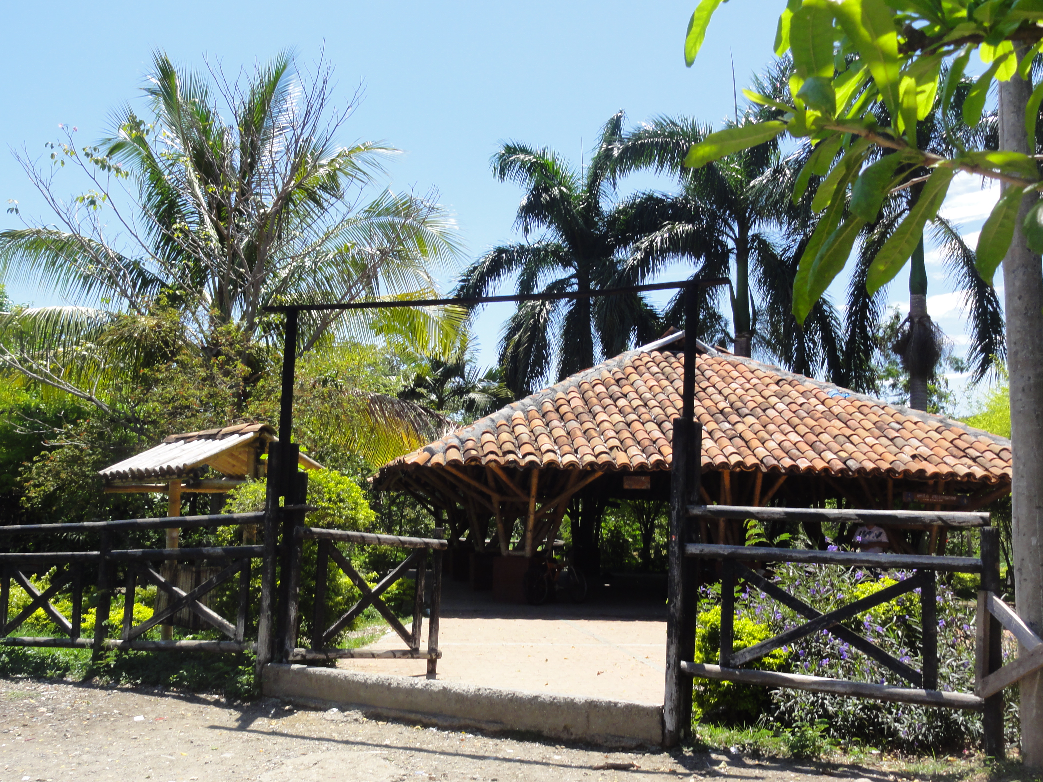 Parque Ecológico Humedal El Samán, Parque de la Salud (2). Cartago, Valle, Colombia.